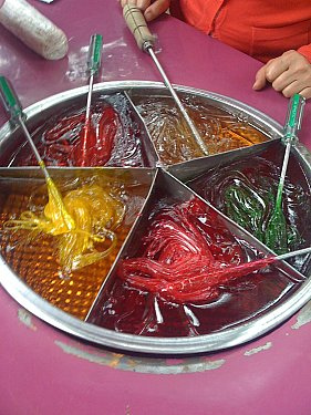 Osmanlı şeker elma şeker pamuk şeker Ottomancandy applecandy cottoncandy pamuk şeker elma şeker Macun şeker lolipop elmaseker macunseker pamukşeker osmanlı macunsekeri seker candystore lolipop şeker Mumu şeker dükkanı şeker kara pamukseker